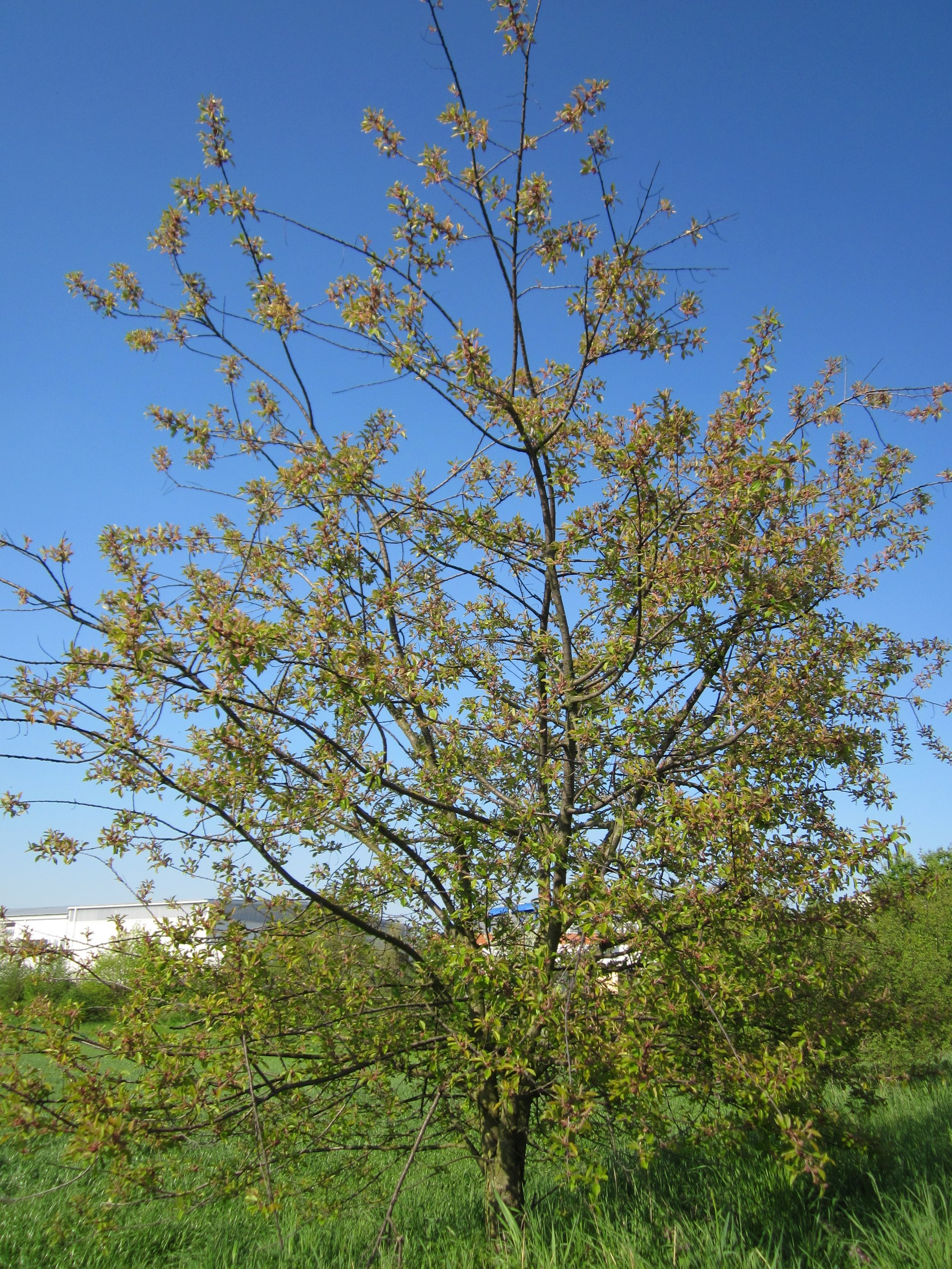 Spätblühende Traubenkirsche (Prunus serotina) im Hockenheimer Rheinbogen